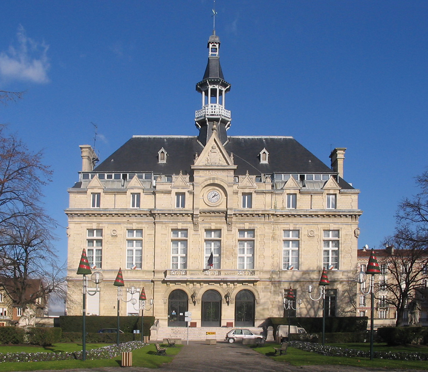 Mairie de la Courneuve.